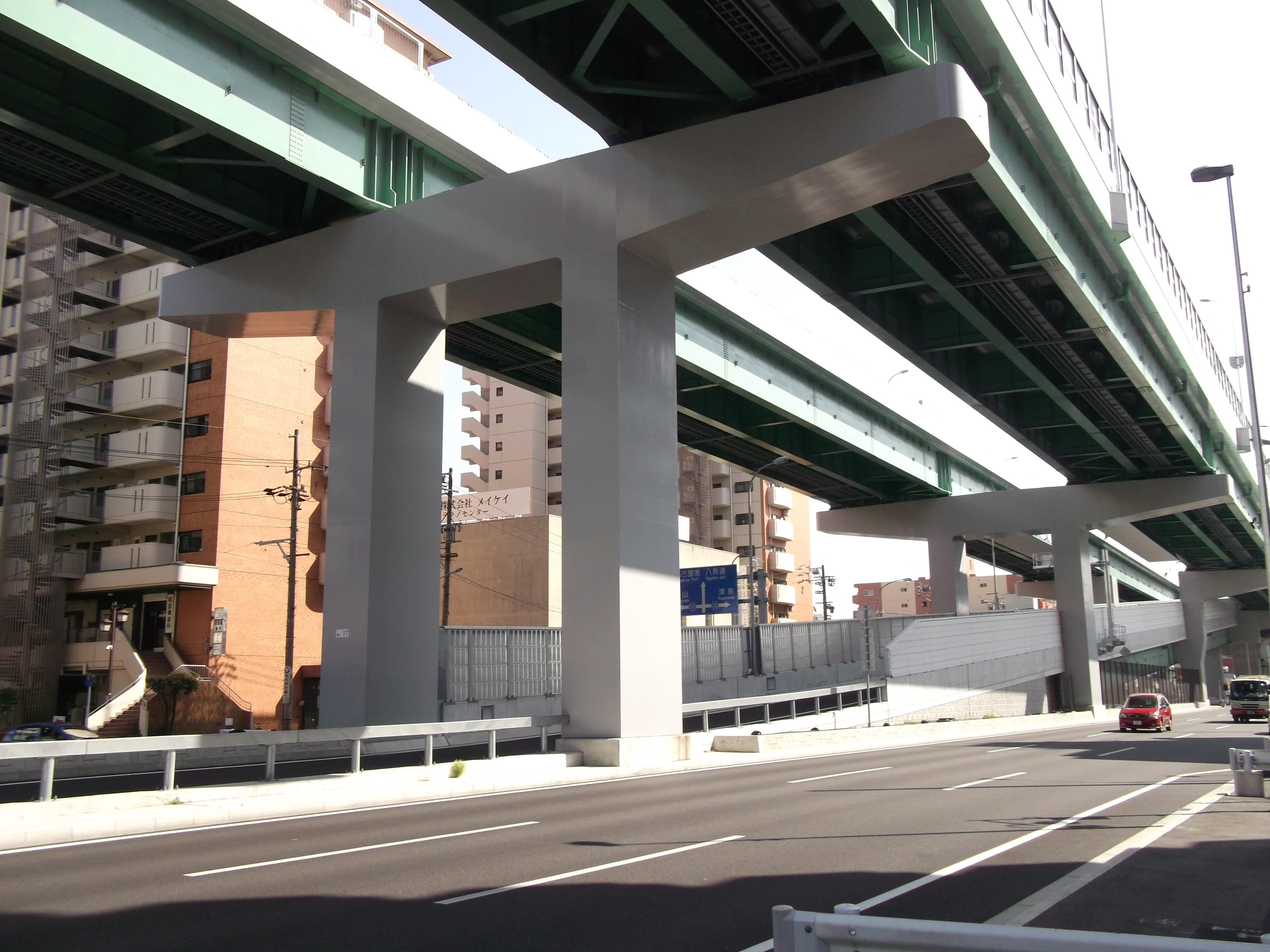 名古屋市中川区八熊二丁目の名古屋高速道路4号東海線の尾頭橋出口を北西側より撮影